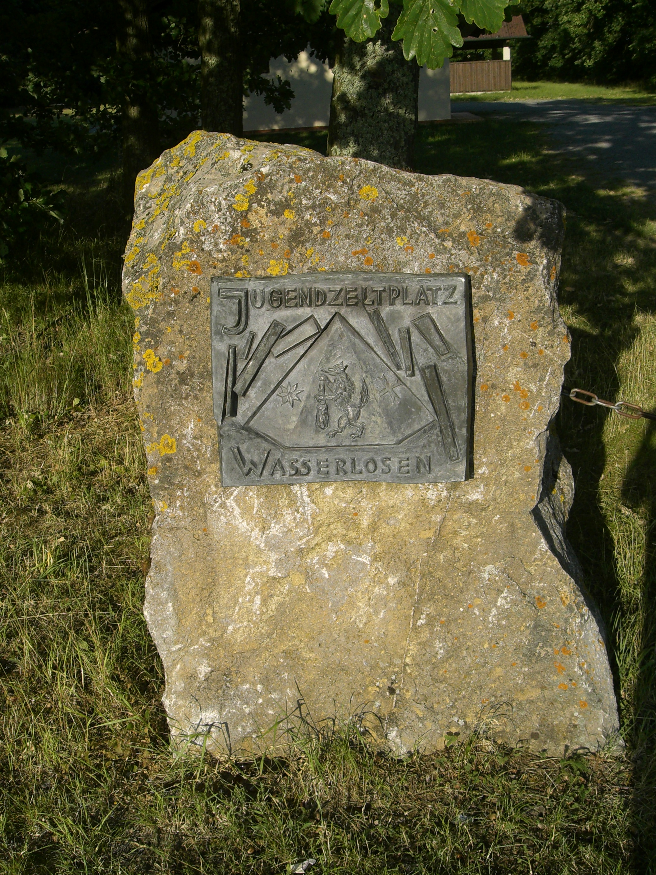 Eingang des Zeltplatzes der Gemeinde Wasserlosen in Wülfershausen